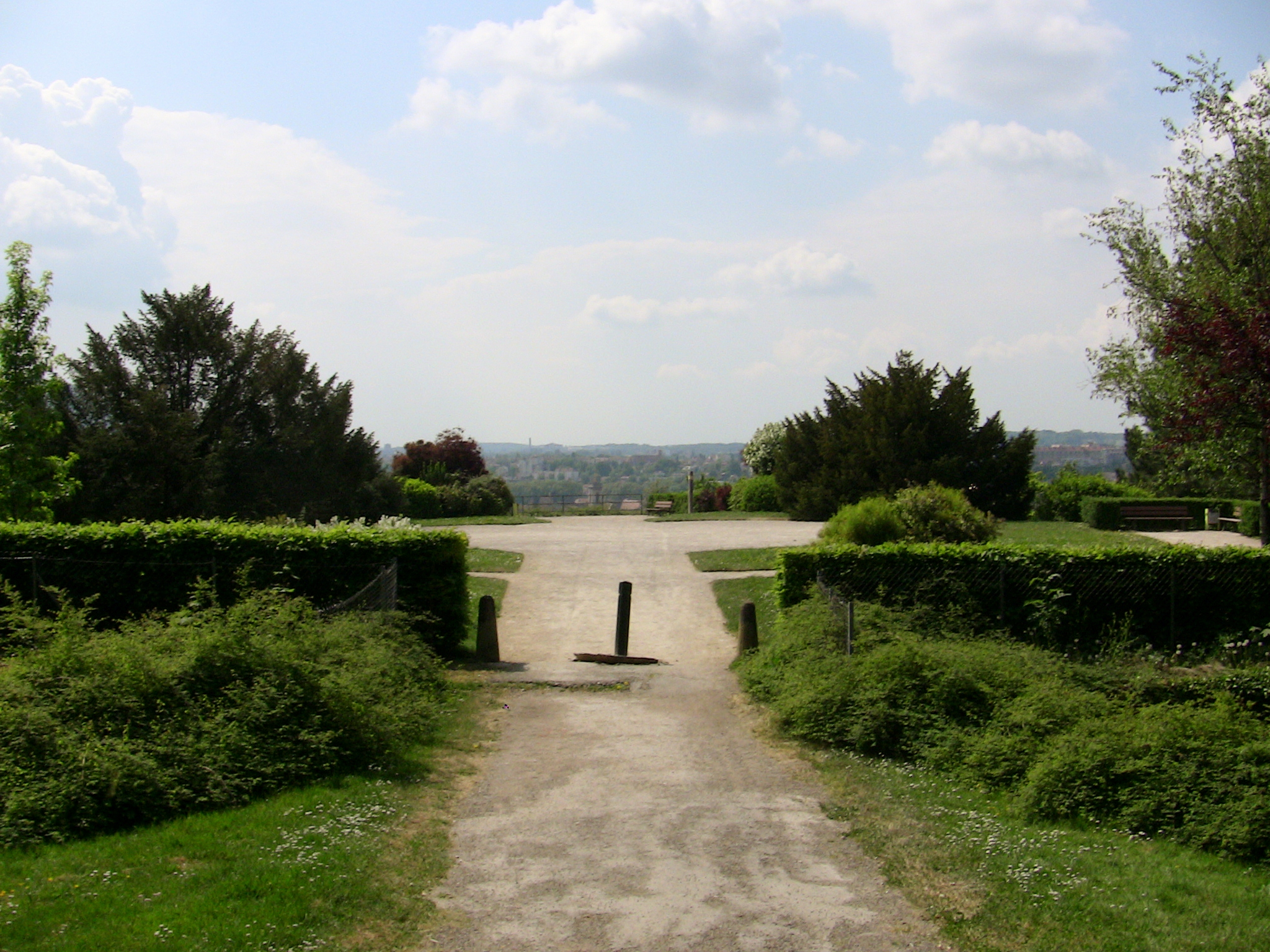 Square du fort de Beauregard à Besançon (Doubs, France).